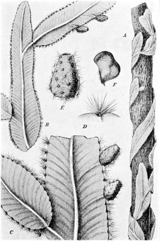 Strophocactus wittii (Echinocereeae; Cactaceae; Planta) Nathaniel Lord Britton és Joseph Nelson Rose "The Cactaceae" c. könyvéből